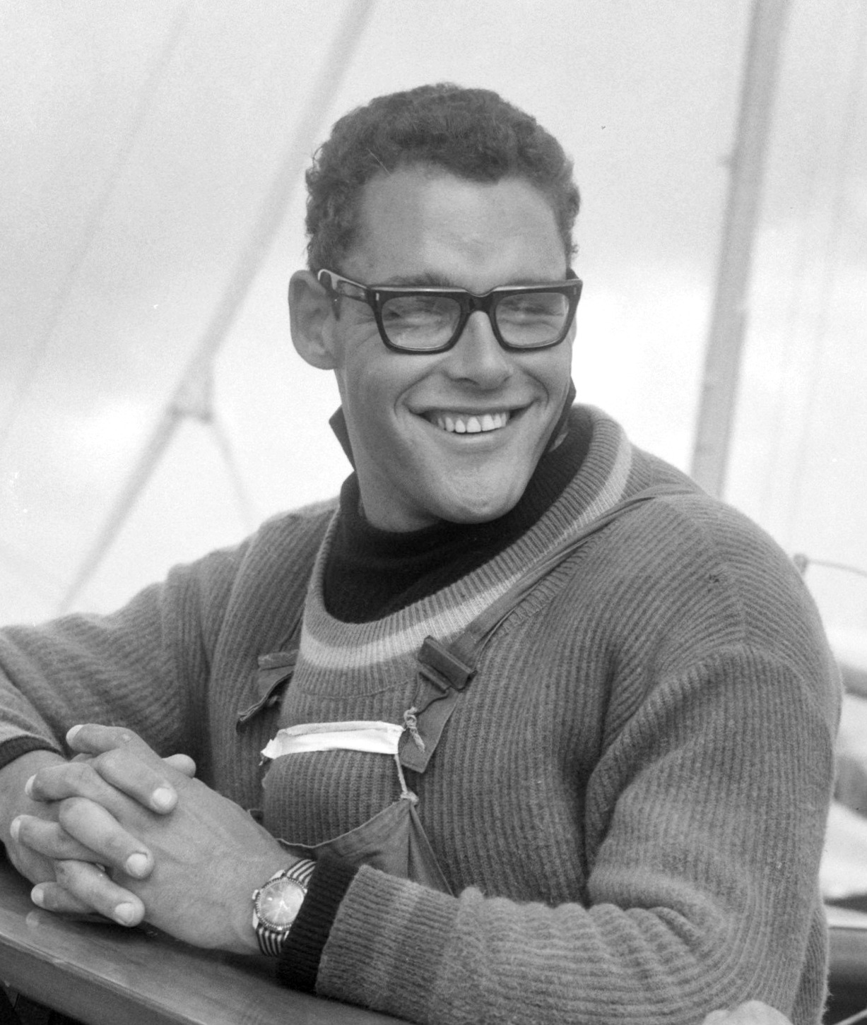 Zeilers voor Tokio, Nick de Jong